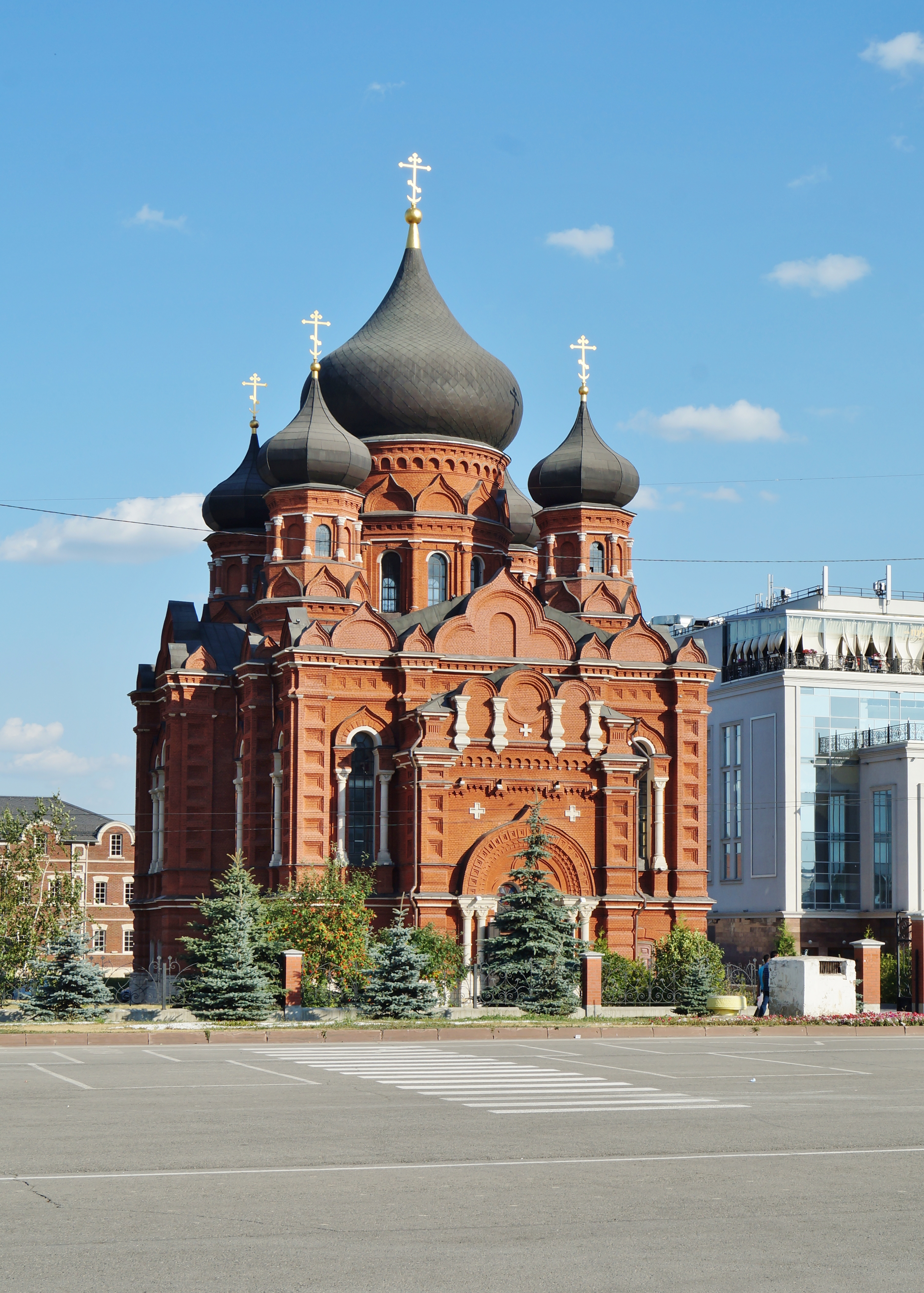 Cathedral of the Dormition at Uspensky Convent (Tula, Russia)